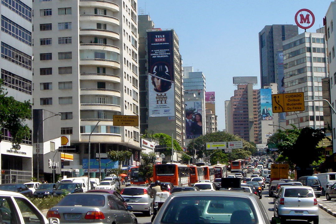 Traffic congestion, Sao Paulo, Brazil (+ open view)